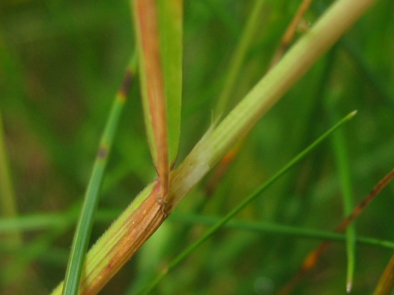 Flaumiger Wiesenhafer (Helictotrichon pubescens), Gragetopshof